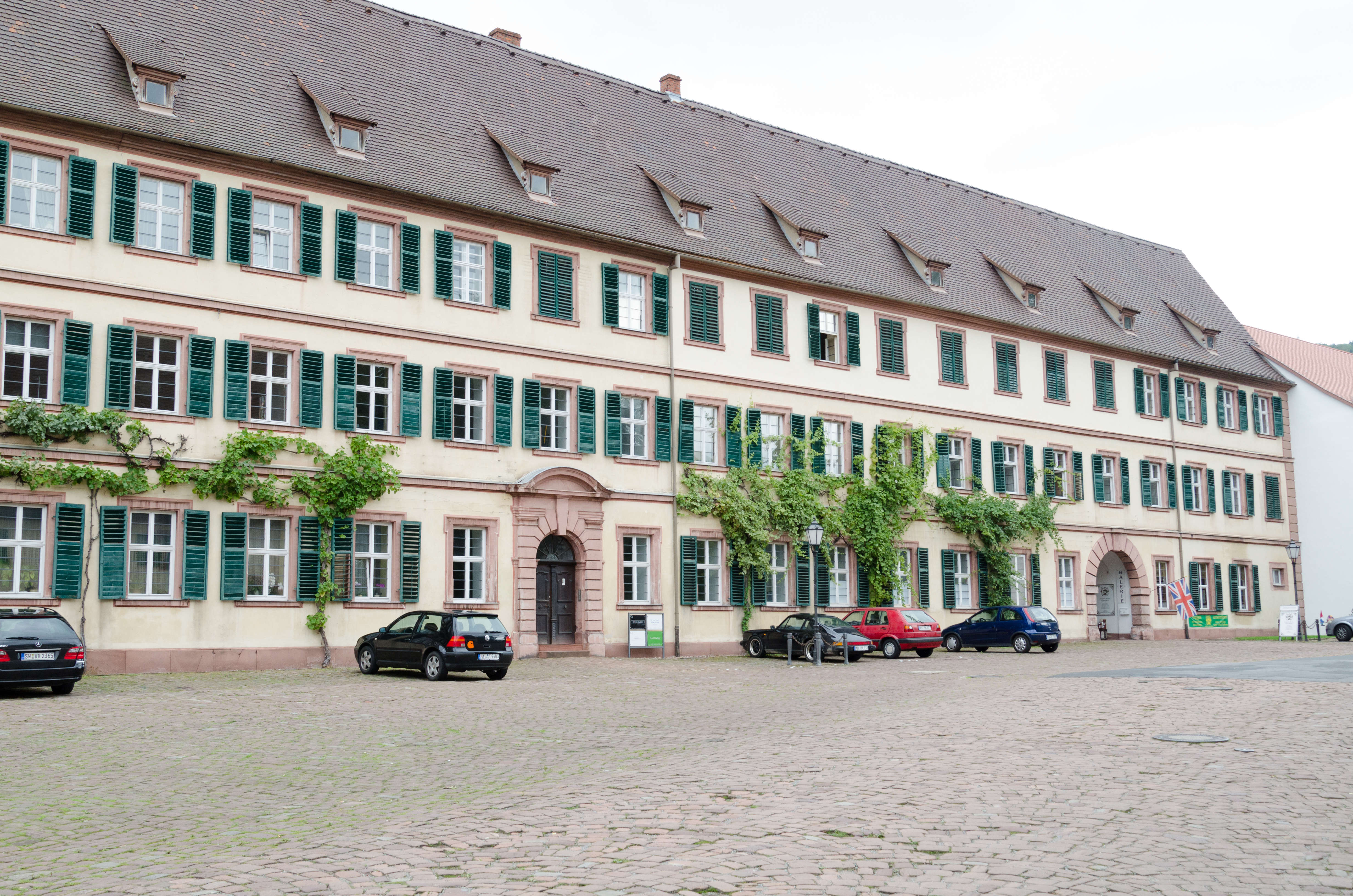 Amorbach,Schloßplatz 1